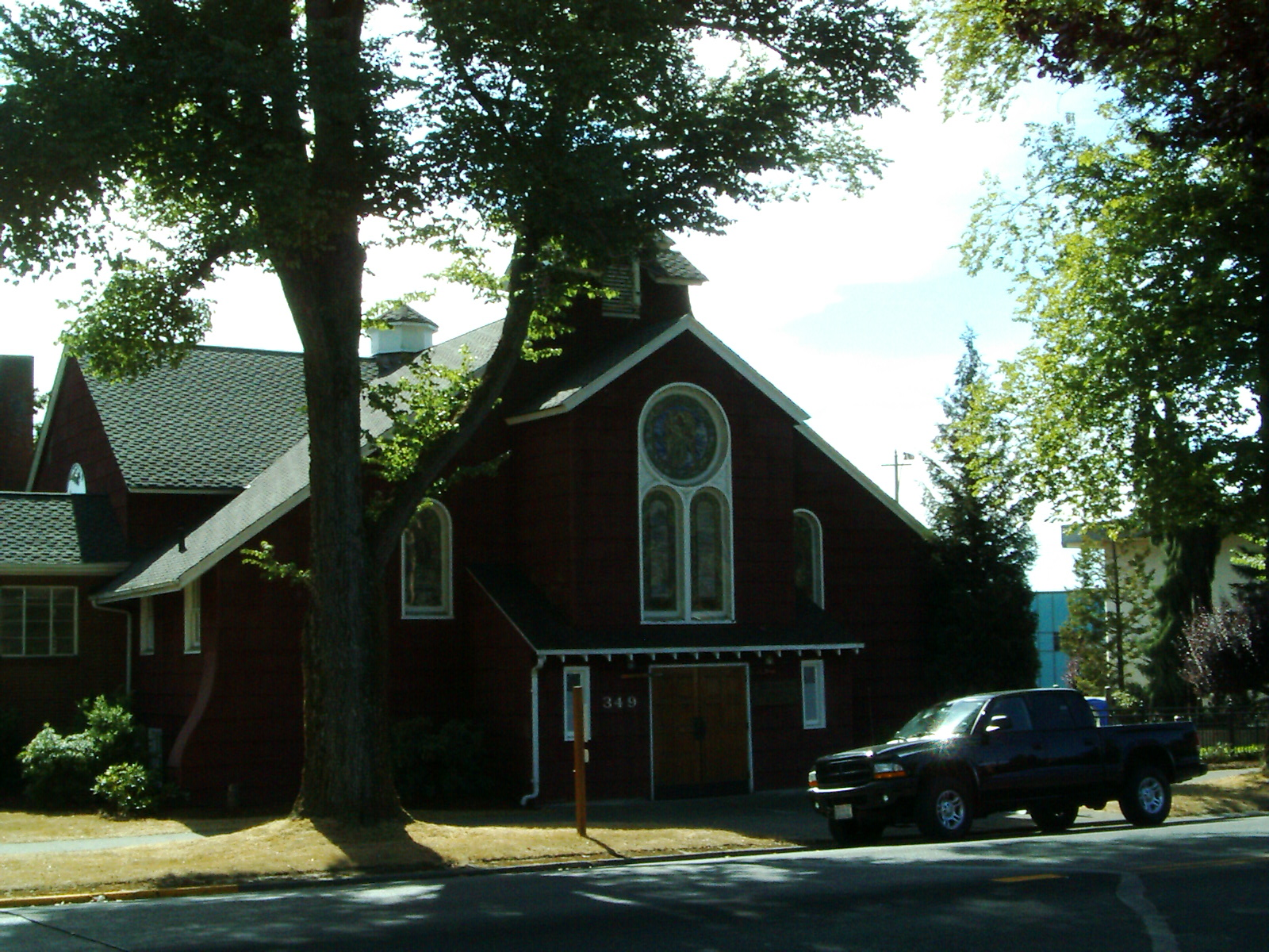 Kirche in Chehalis, Washington Sonstiges: ...